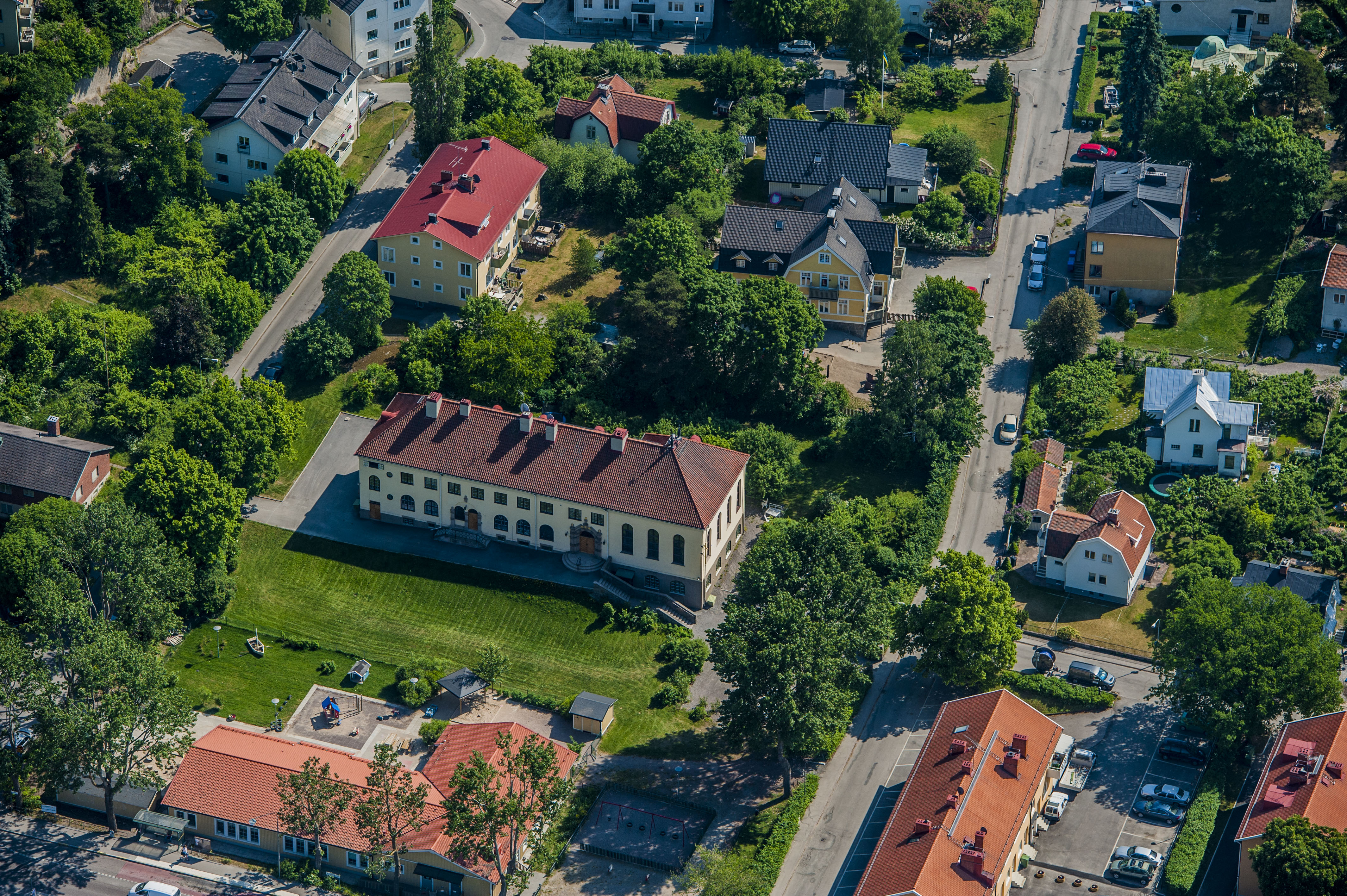 Mariehäll ka